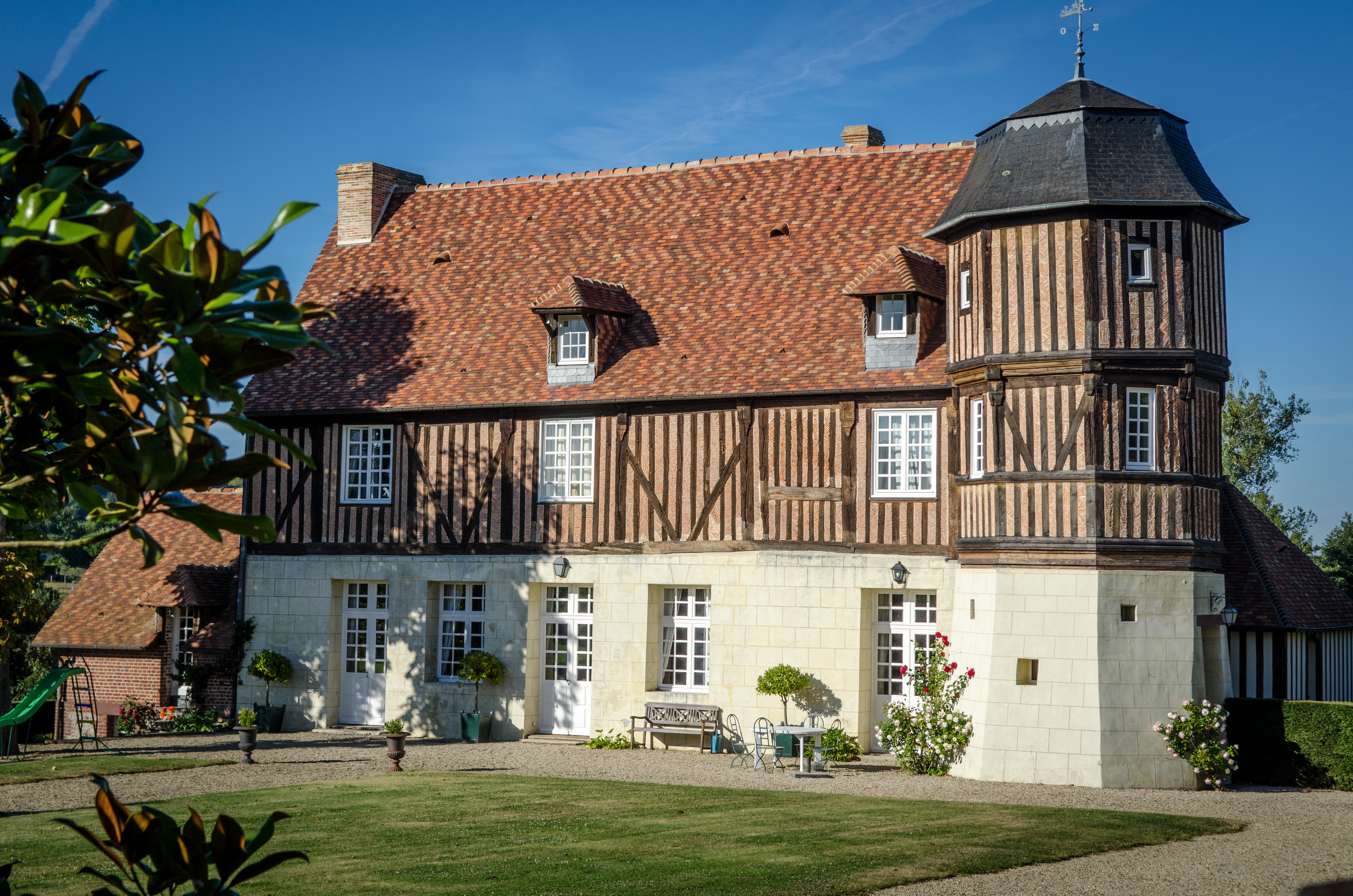 Manoir de Caudemone. La chapelle-Haute-Grue